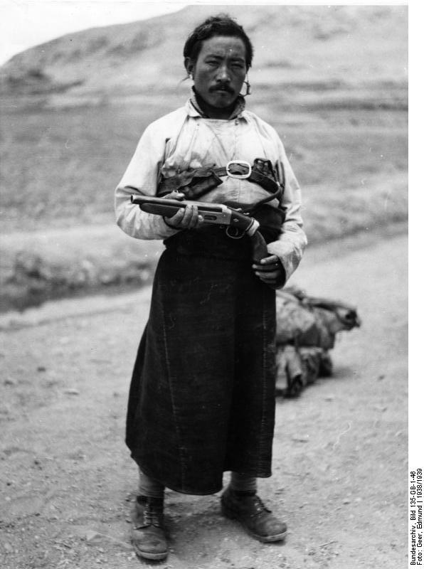 Kala, Postbeförderung in Tibet Information added by Wikimedia users.